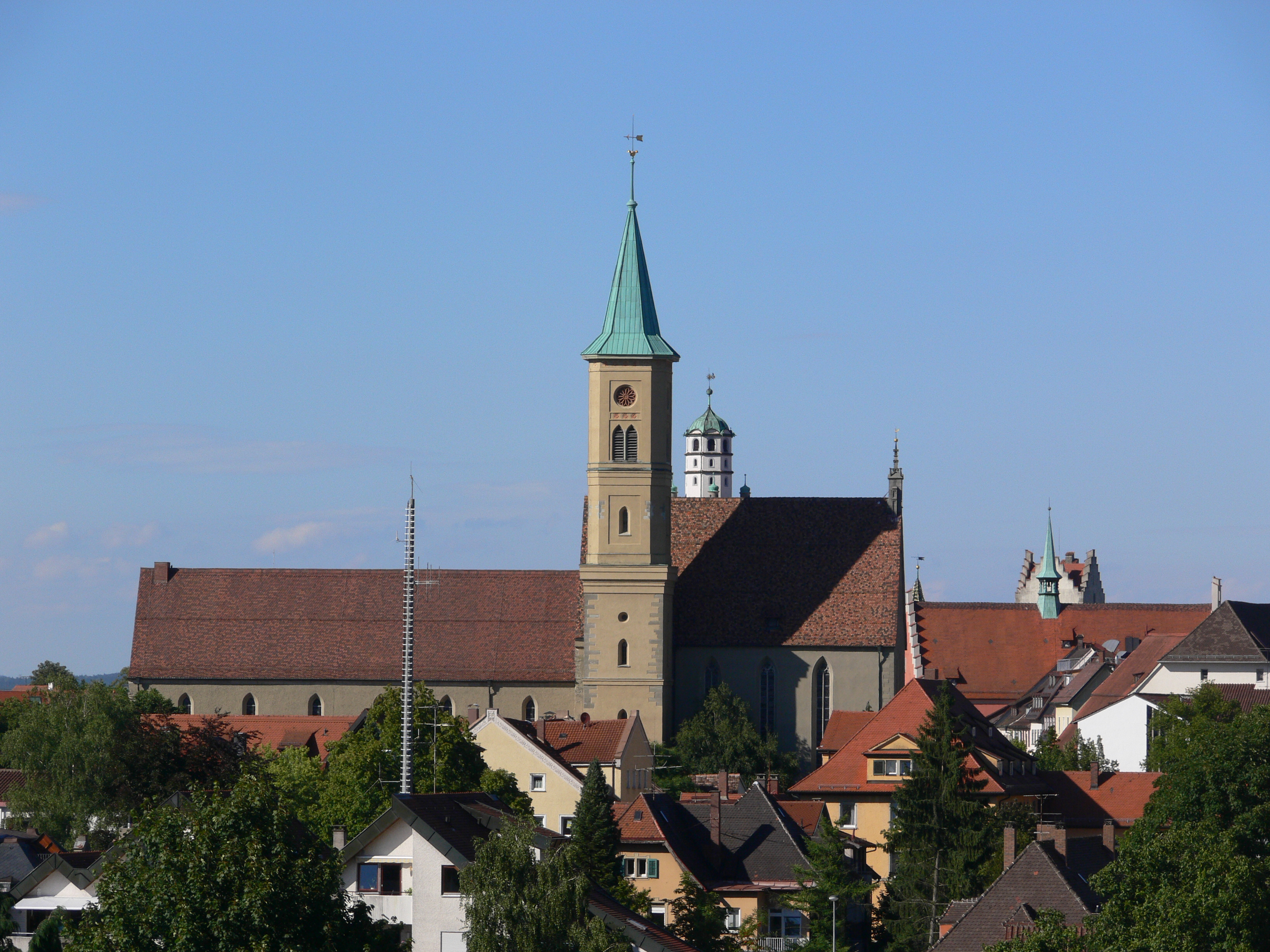 Ravensburg: Evangelische Stadtkirche, Blick von Süden (Federburgstraße, Höhe Urbanstraße)